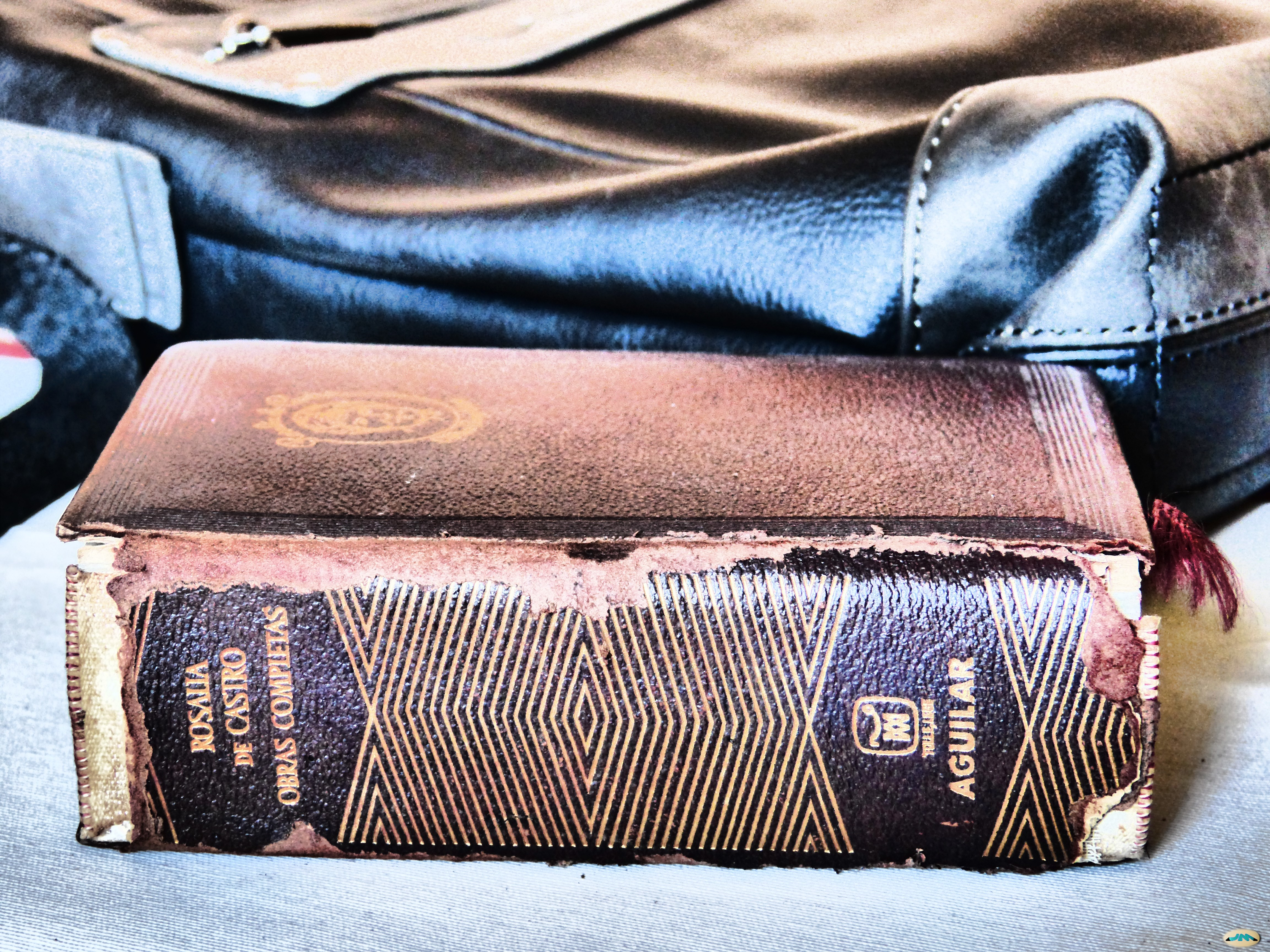 Si cantan, es ti que cantas, si choran, es ti que choras, y es ó marmurio d'o rio y es á noite y es á aurora. De Rosalía de Castro, Follas novas